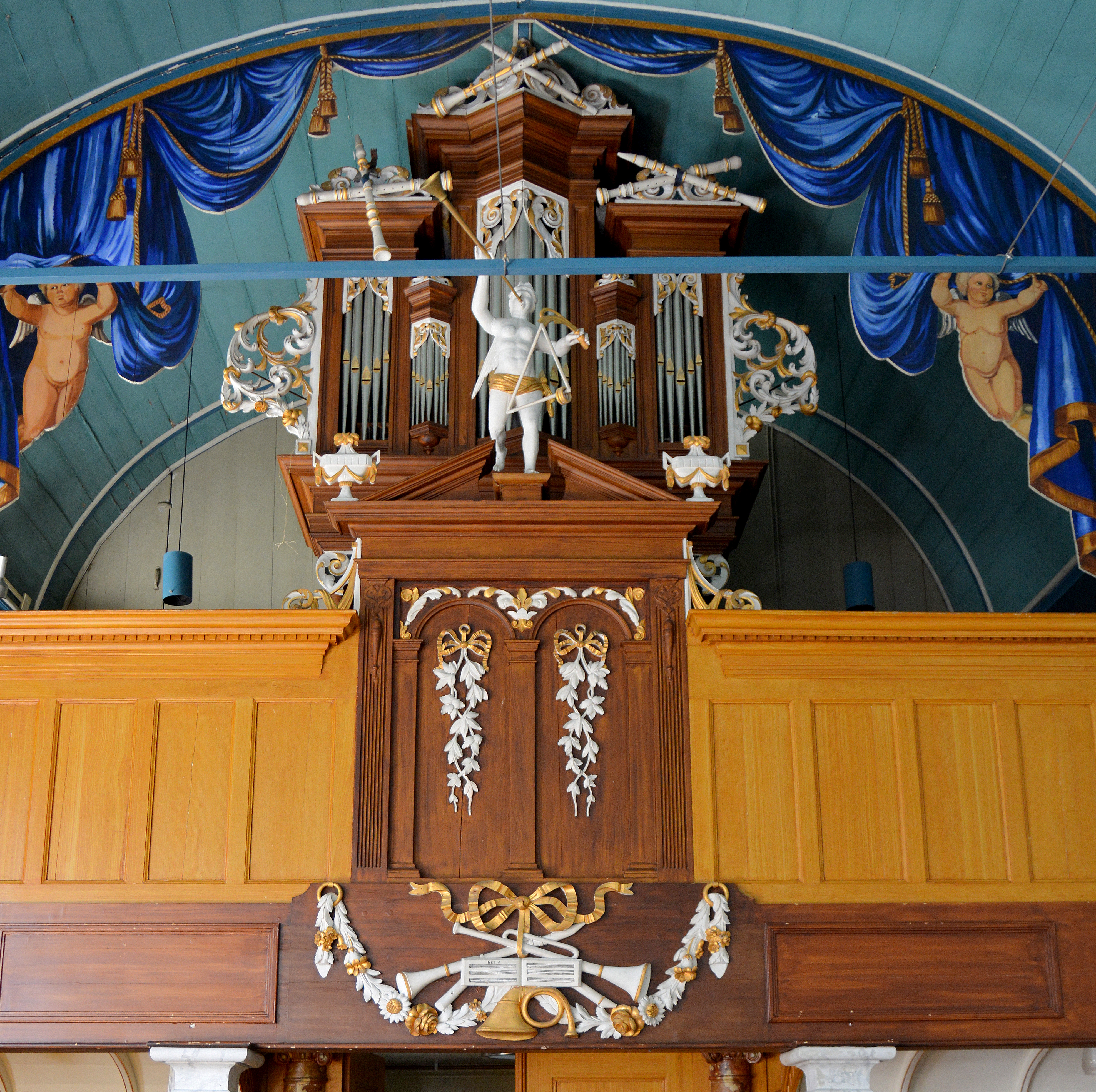 Blessum, Mariakerk, orgel